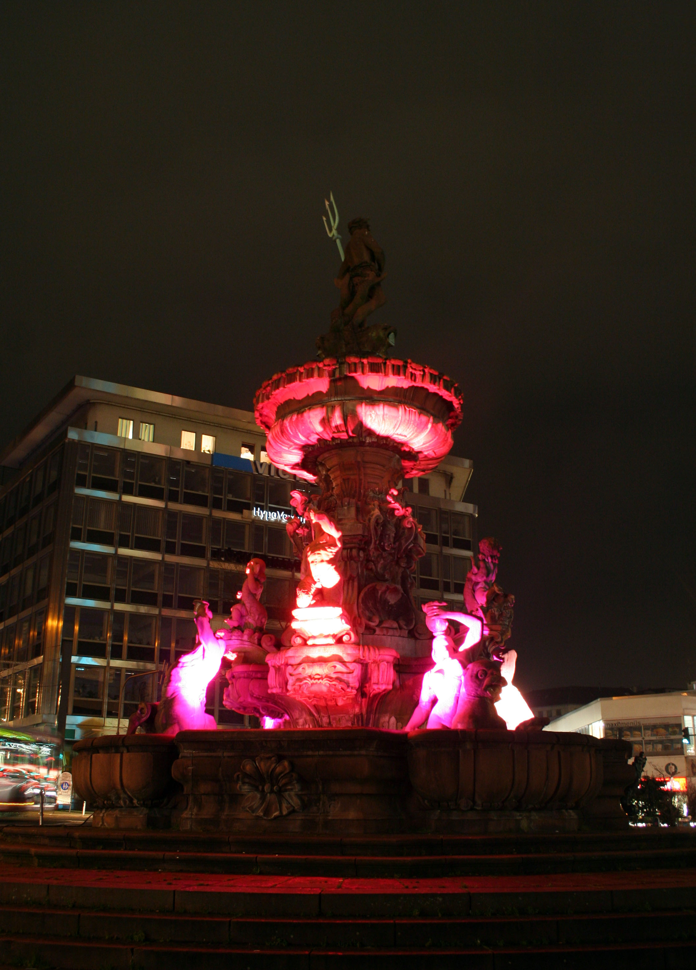 Beschreibung: Jubiläumsbrunnen in Wuppertal- Elberfeld Quelle: Selbst erstellt Datum: 17.Dezember 2006/ 24.Februar 2007 Autor: Thomas Kathöfer